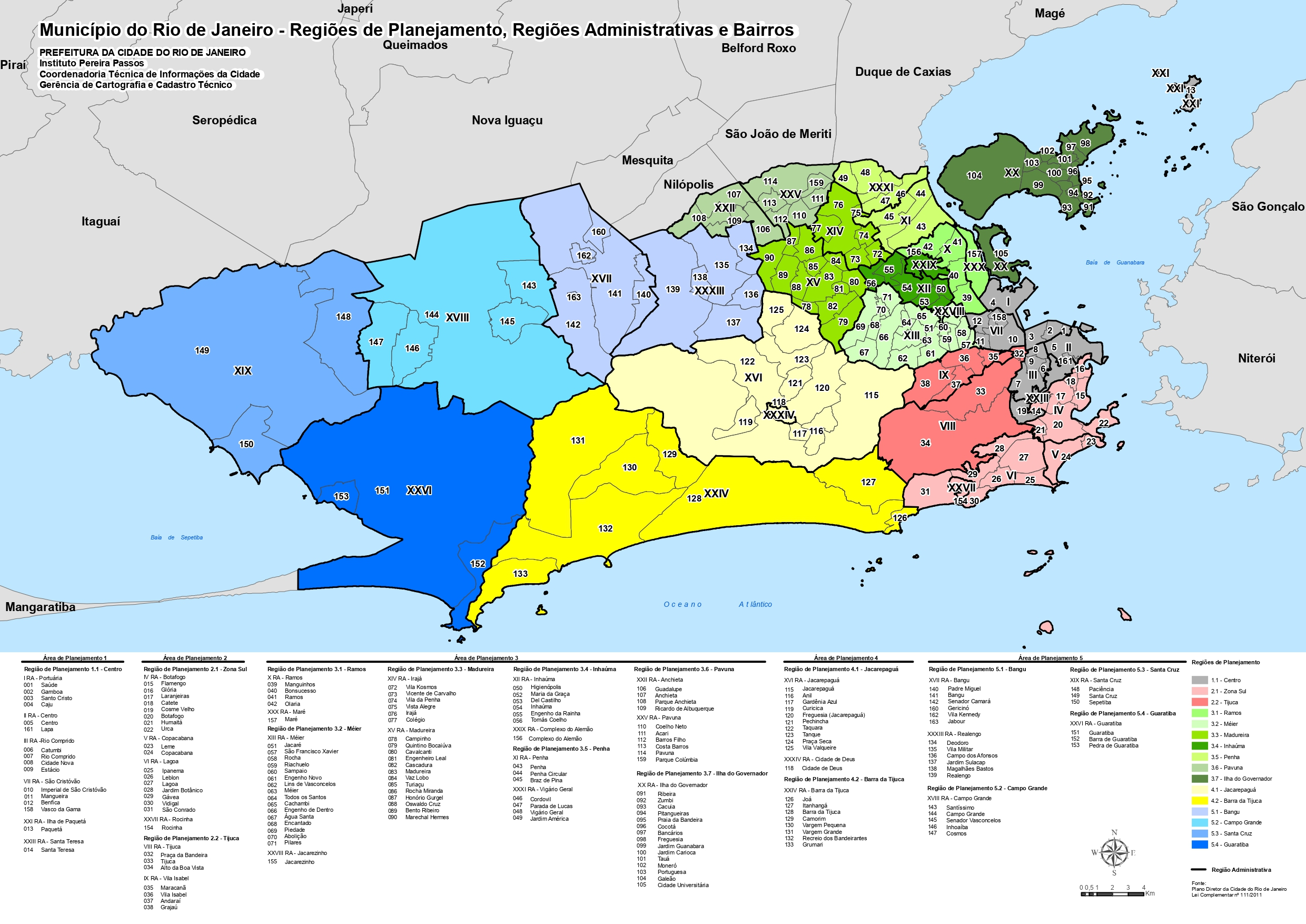 Regiões de Planejamento (RP), Regiões Administrativas (RA) e Bairros do Município do Rio de Janeiro, atualizados em 2020.